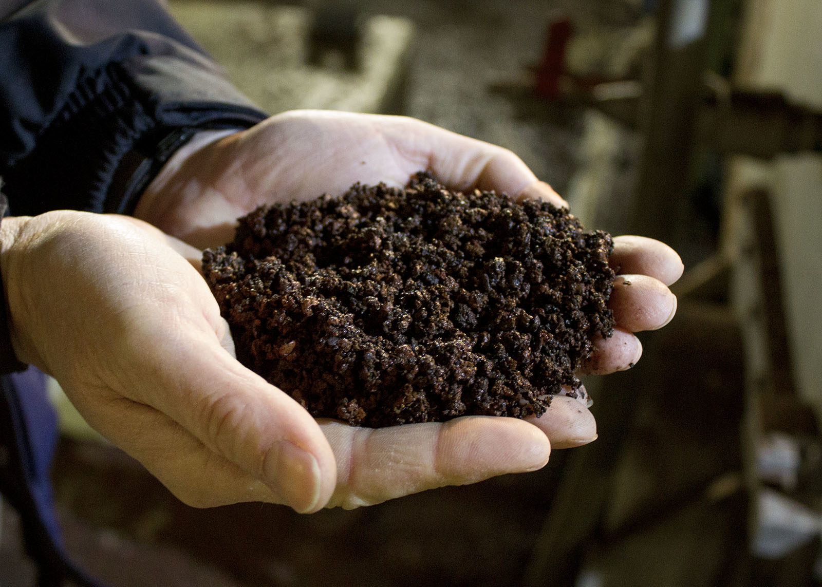 Klärschlammasche aus der Schlamm-Monoverbrennung in der ERZO Oftringen; Phosphorgehalt 6–8 %